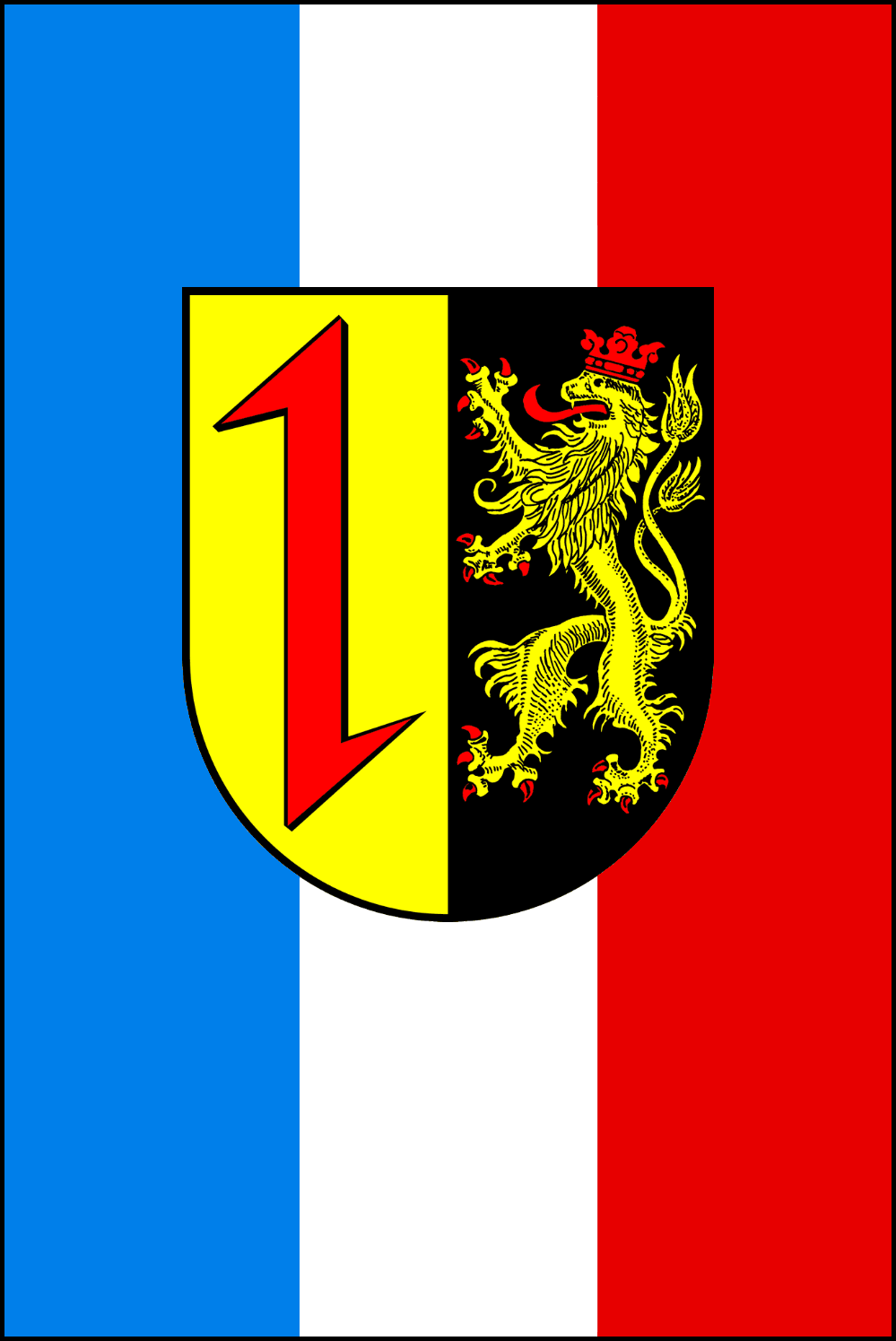 Flagge der Stadt Mannheim